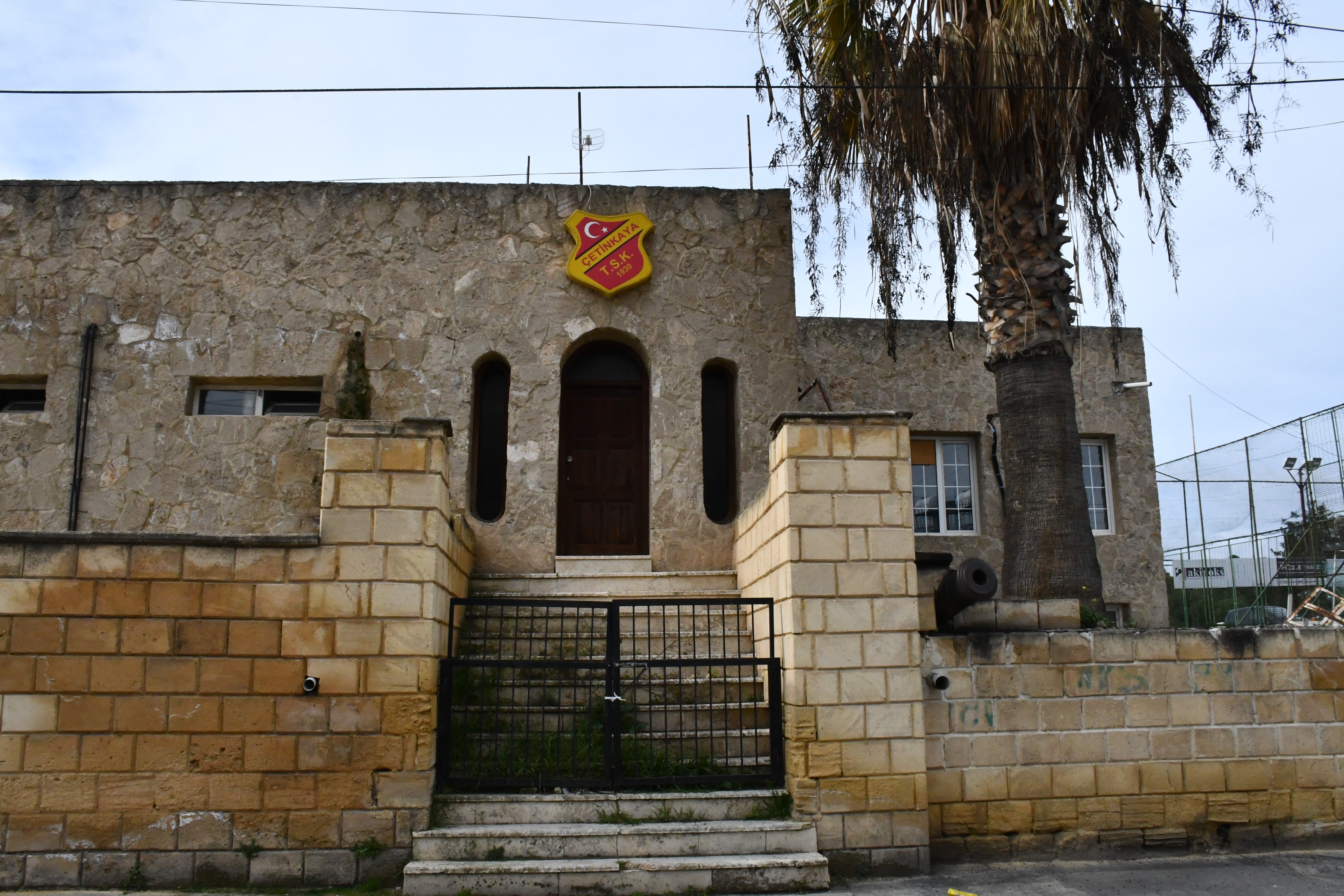 Çetinkaya T.S.K yola bakan giriş kapısı